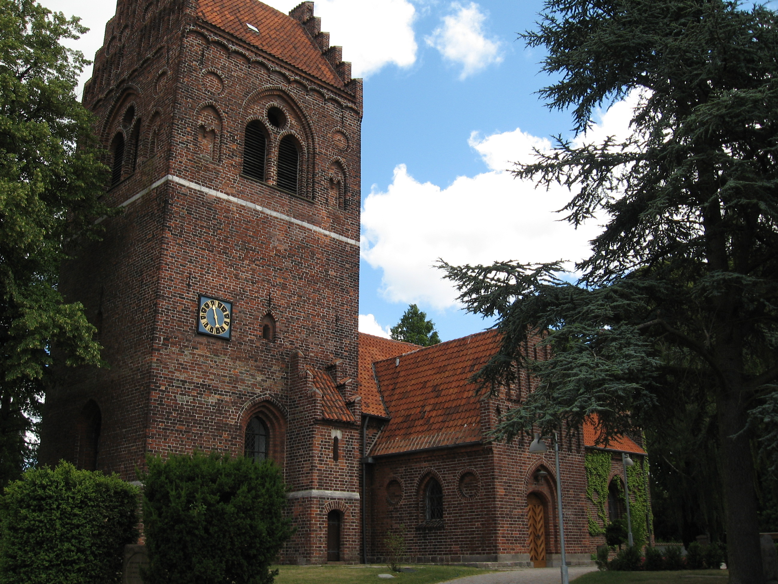 Photo of Glostrup Kirke, Glostrup, Denmark